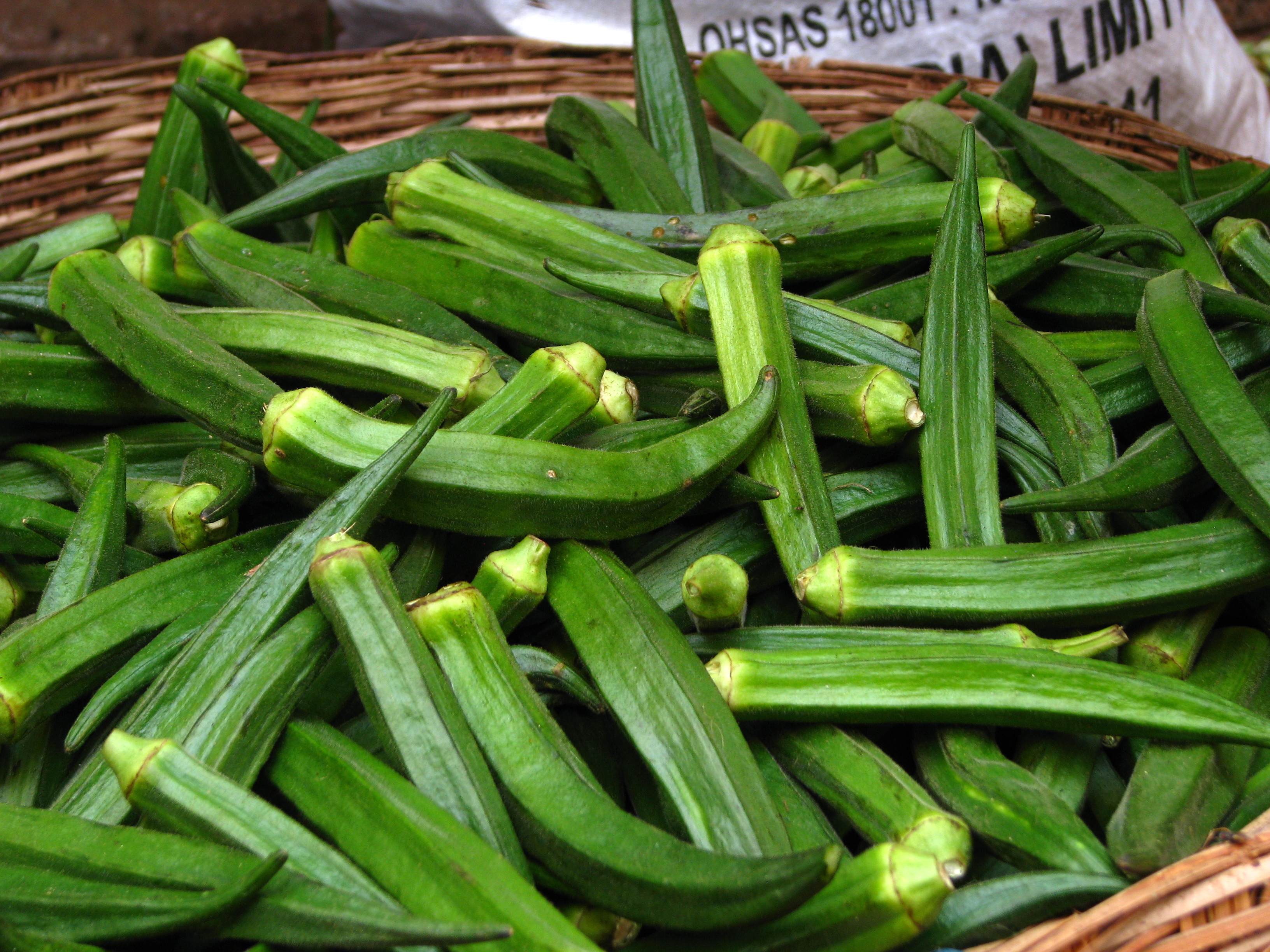 India - Koyambedu Market - Ladies Finger 04